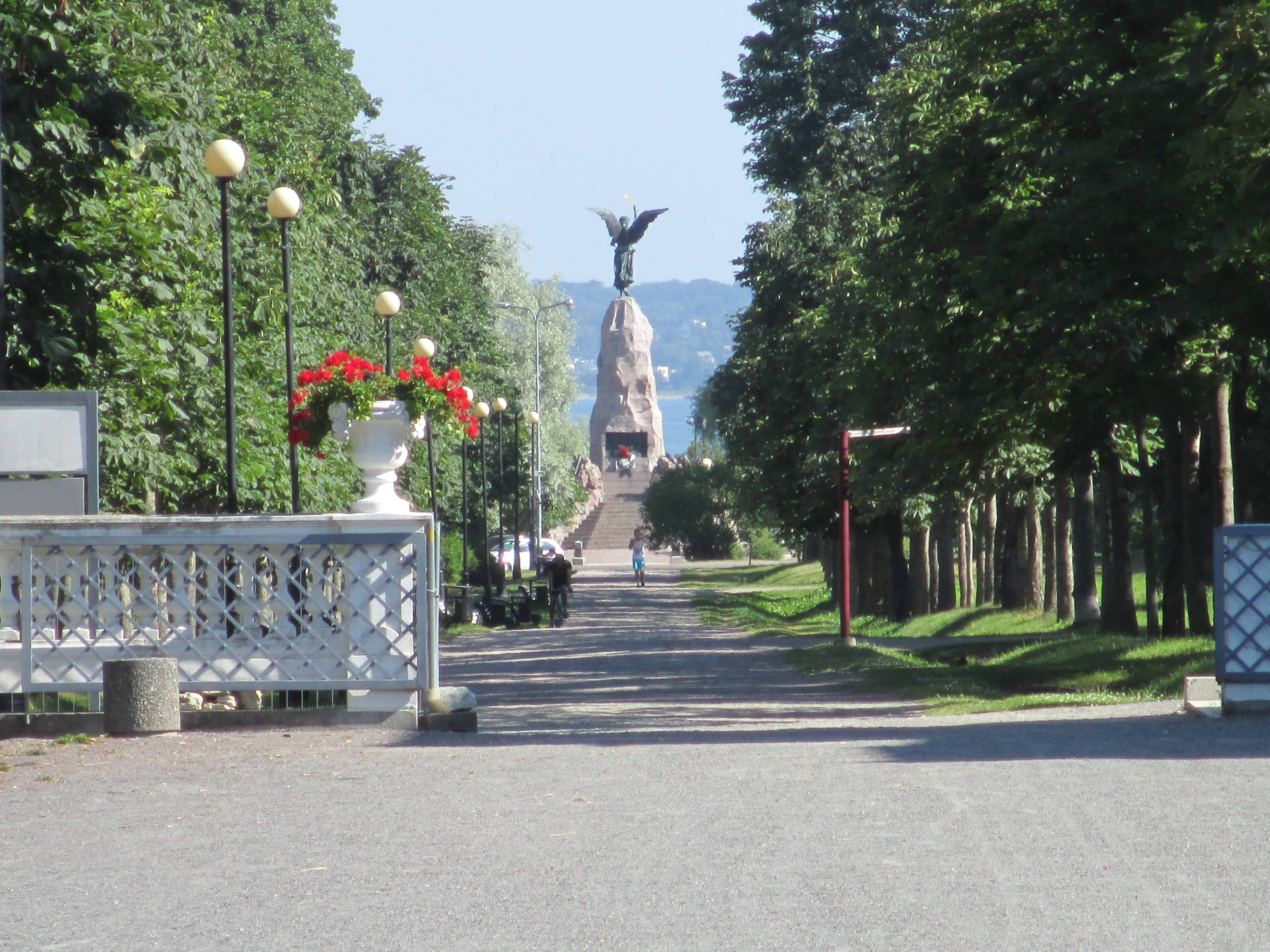 אנדרת רוסלקה מפארק קאדריורג בטאלין